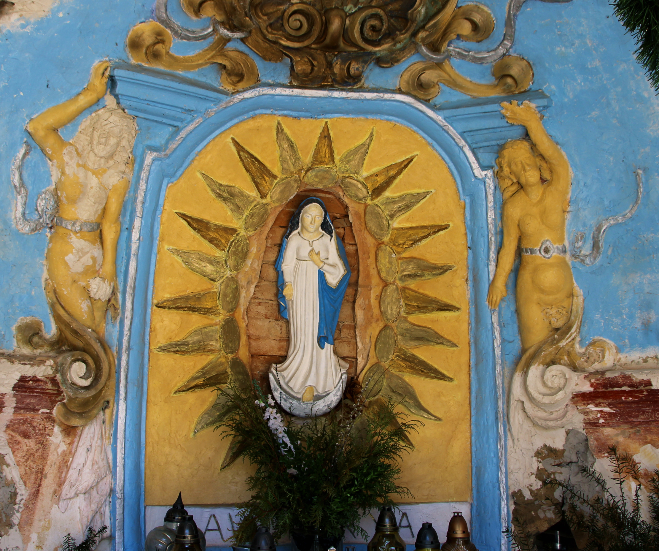 Die Kapelle der Heiligen Anna in Pelhřimovy, Tschechien.